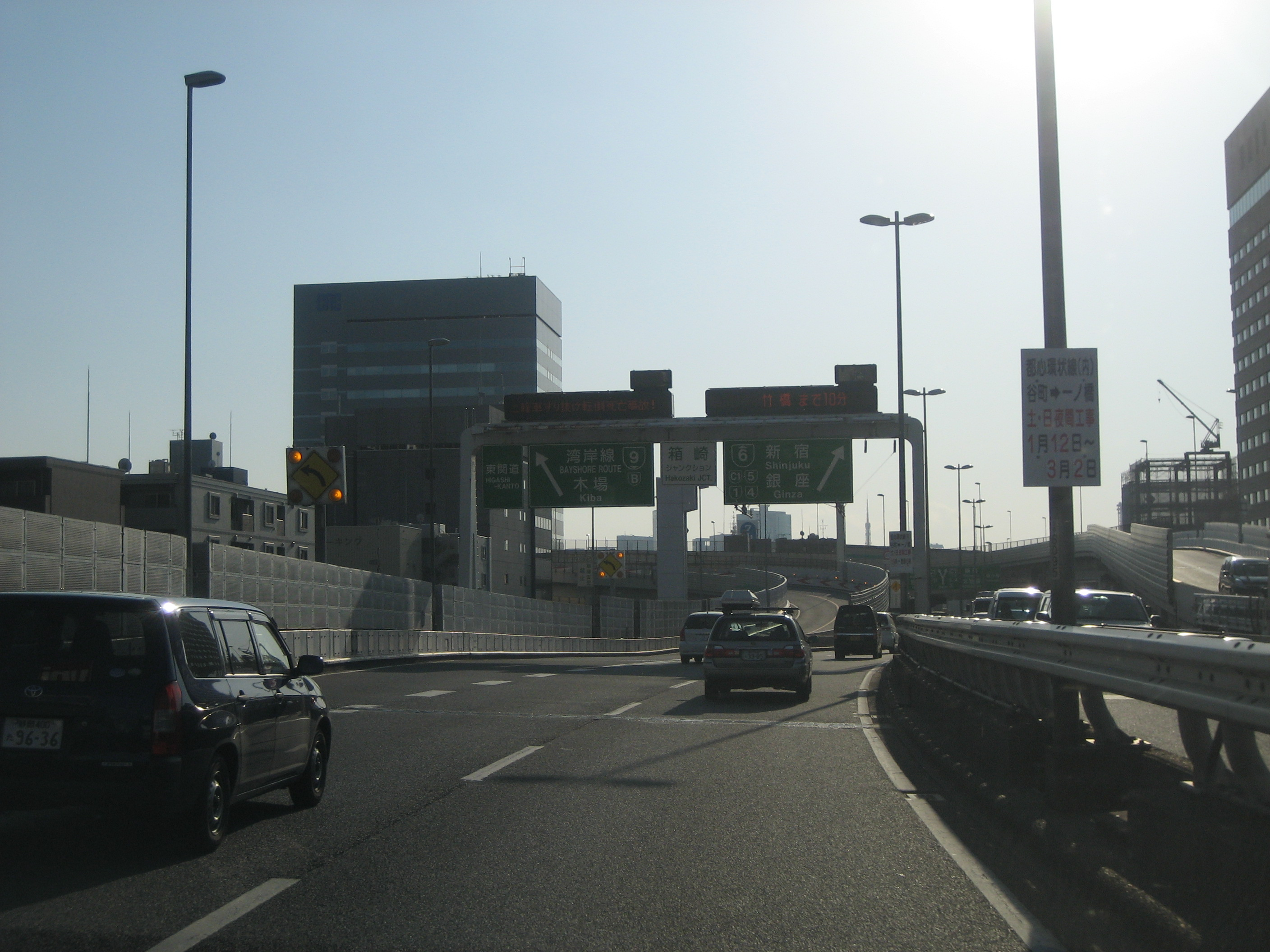 首都高速箱崎ジャンクション